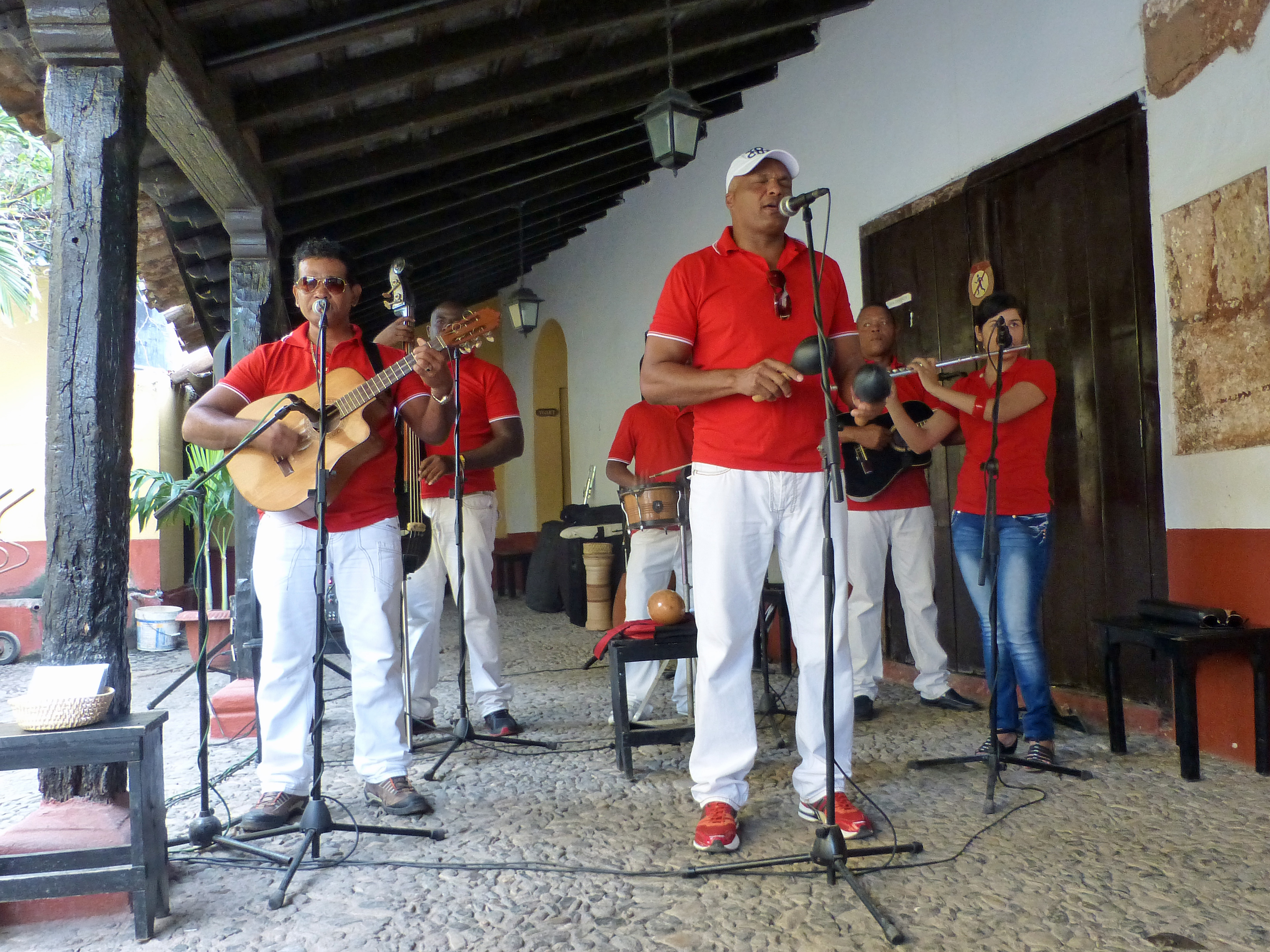 Musiciens à la Canchanchara (Trinidad, Cuba)